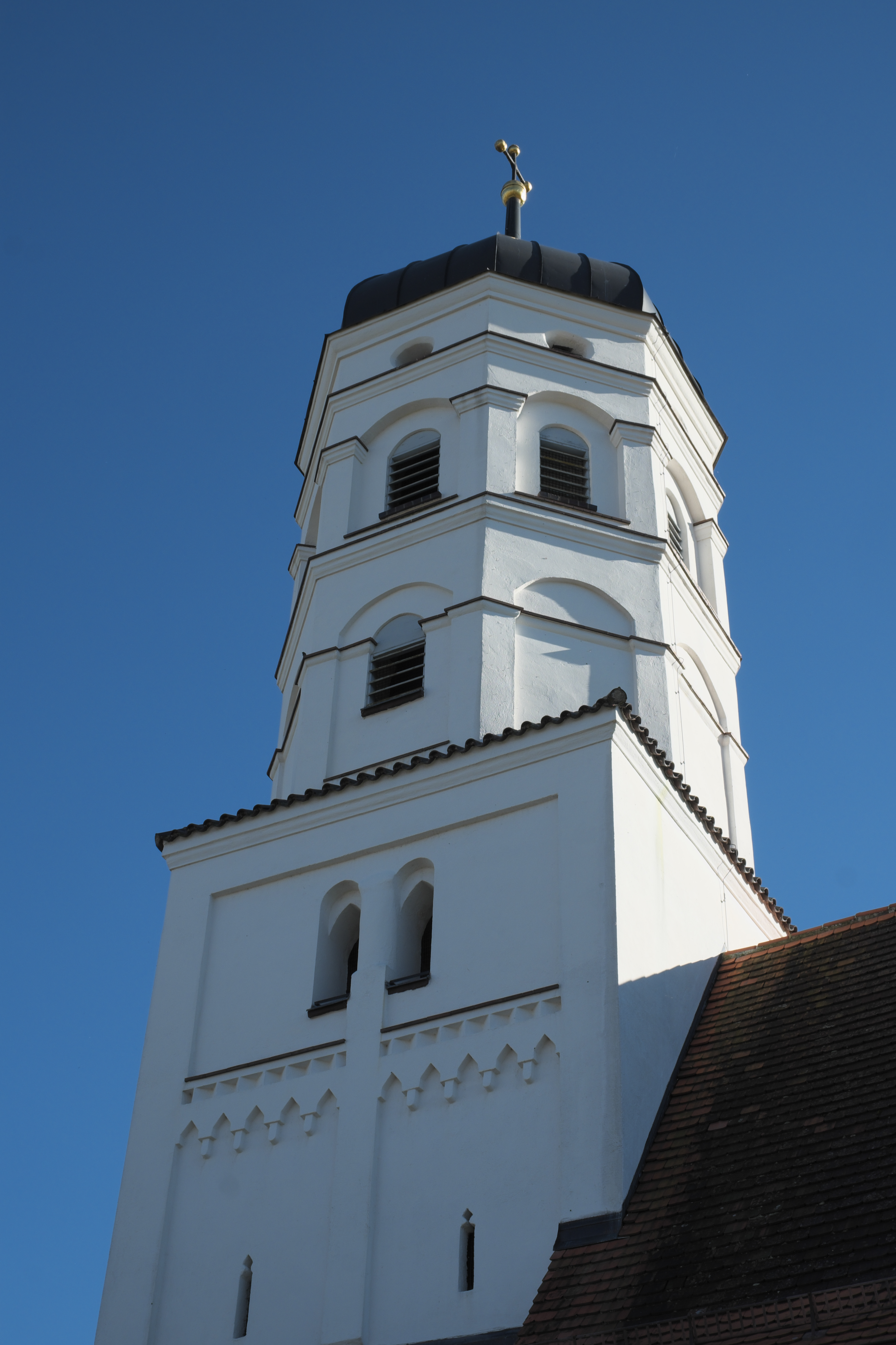 Katholische Filialkirche Unsere Liebe Frau in Petzenhausen, einem Ortsteil von Weil (Oberbayern) im Landkreis Landsberg am Lech (Bayern/Deutschland)